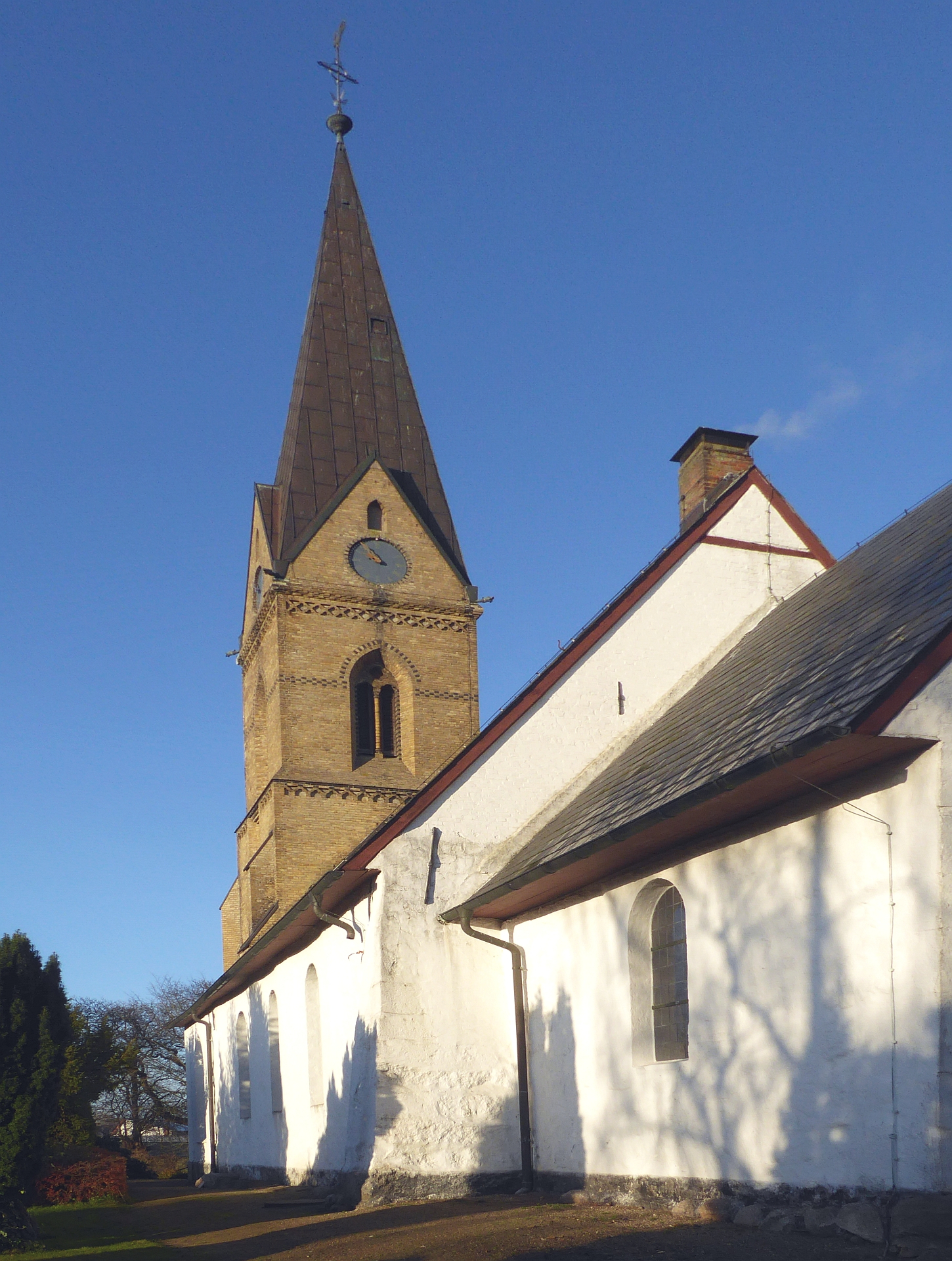 Süderbrarup romanische St-Jacobus-Kirche 12 - 19. Jahrhundert Feldstein- & Backsteinkirche Foto 2018 Wolfgang Pehlemann P1280445.jpg